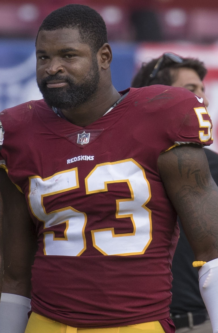 Eagles at Redskins 9/10/17